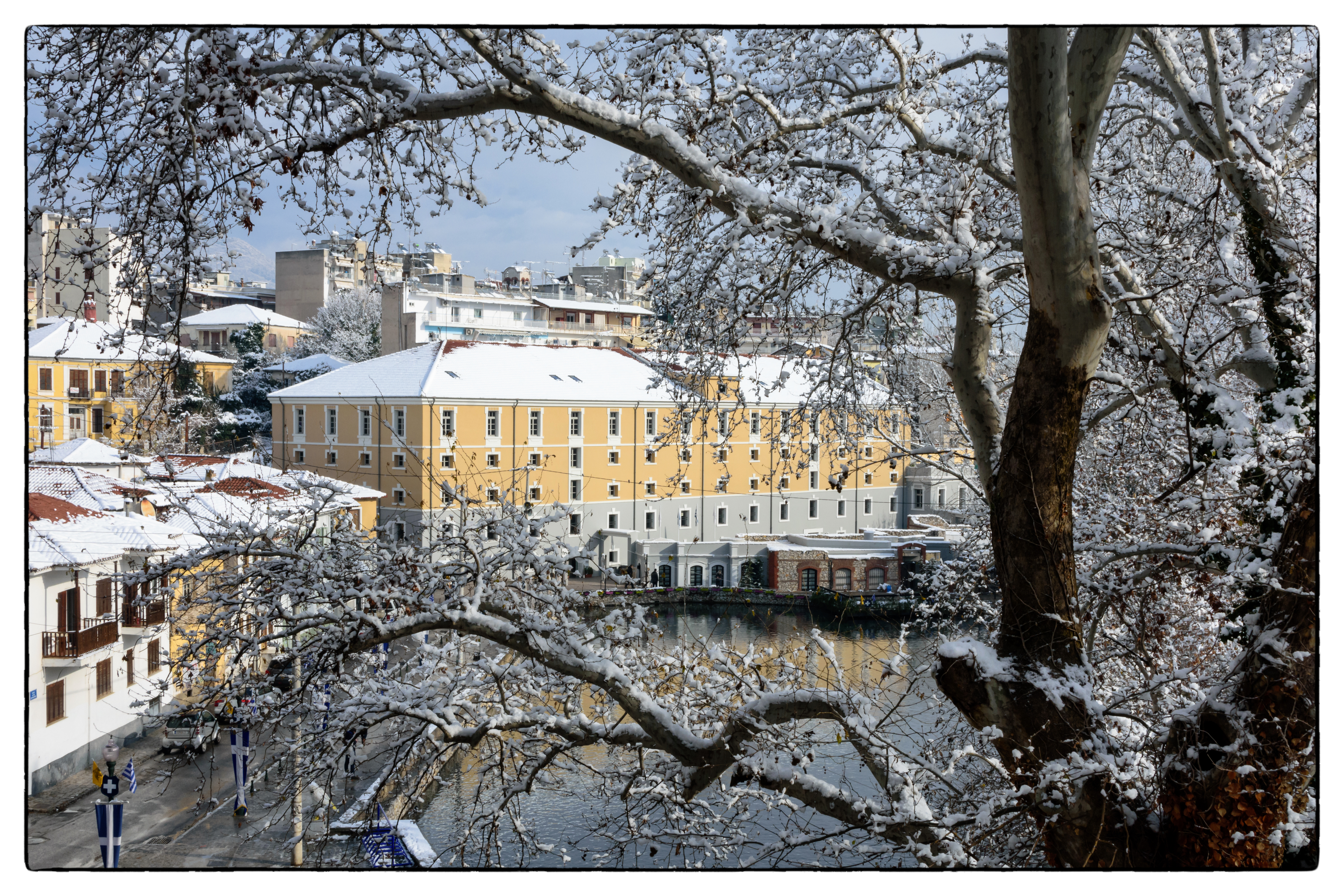 Καπναποθήκη Σπίρερ, Δράμα«Καπναποθήκη Σπίρερ»